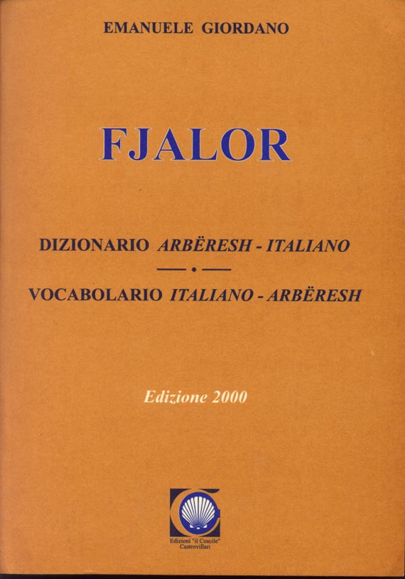 Fjalor i Arbëreshëvet t'Italisë (Arbërisht - Italisht, Italisht - Arbërisht) - Dizionario degli Albanesi d'Italia (Vocabolario Italiano - Arbëresh) di Zoti Papàs Emanuele Giordano. Galleria Editrice "il Coscile", Castrovillari 2000, prima Ed. del 1963.